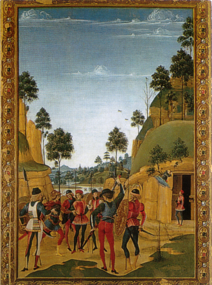 Saint Bernardino Release a Prisoner Pintoricchio Panel Perugia, Galleria Nazionale dell'Umbria